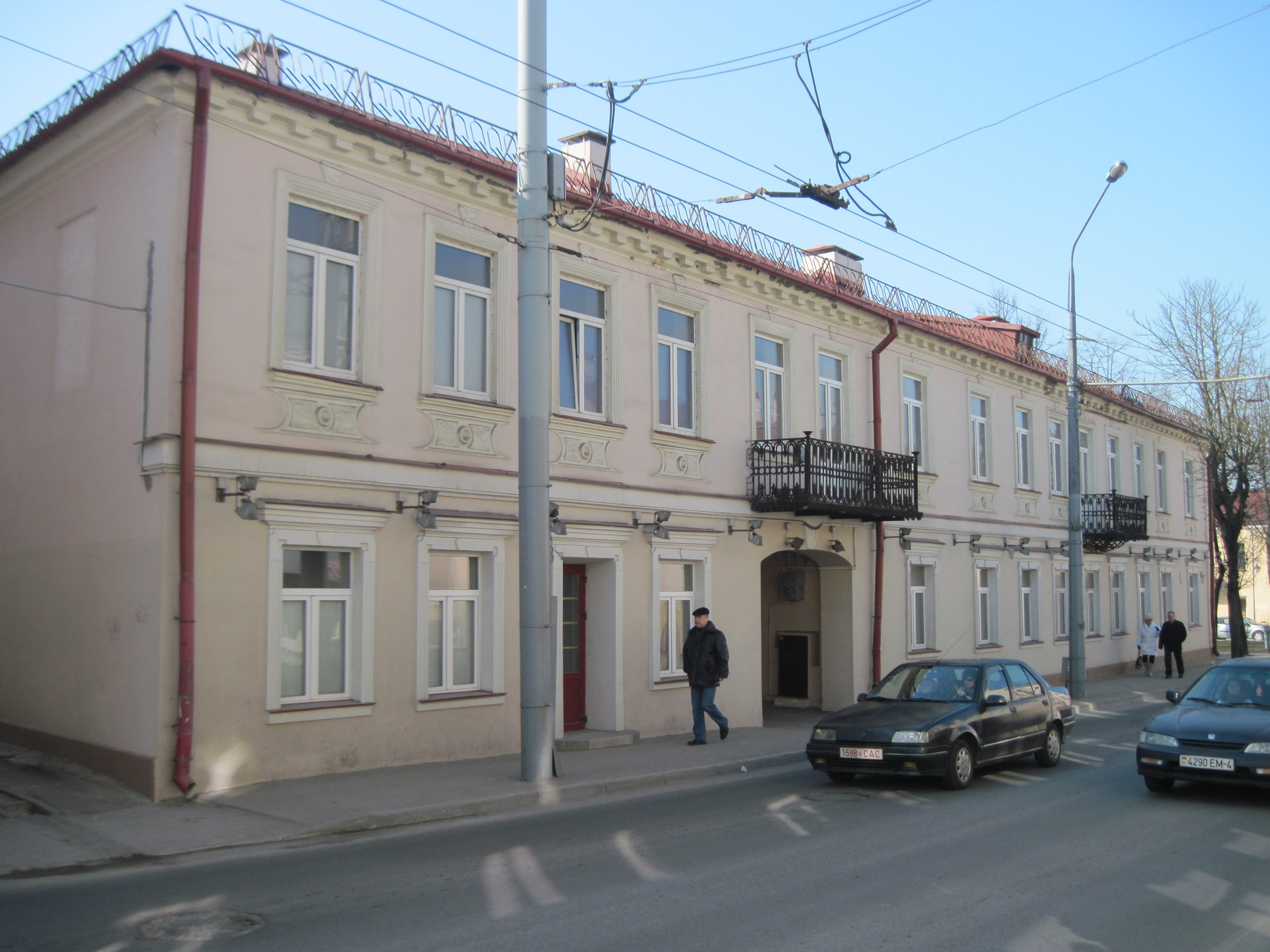 Забудова гістарычнага цэнтра Гродна. Вуліца К. Маркса, 19.